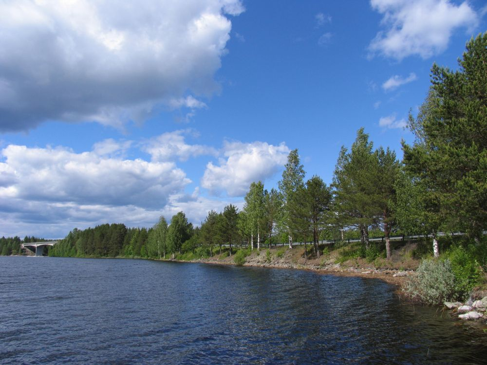 Ahveninen bridge Eno